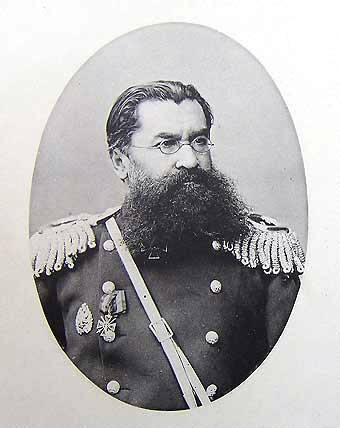 Левшин, Лев Львович